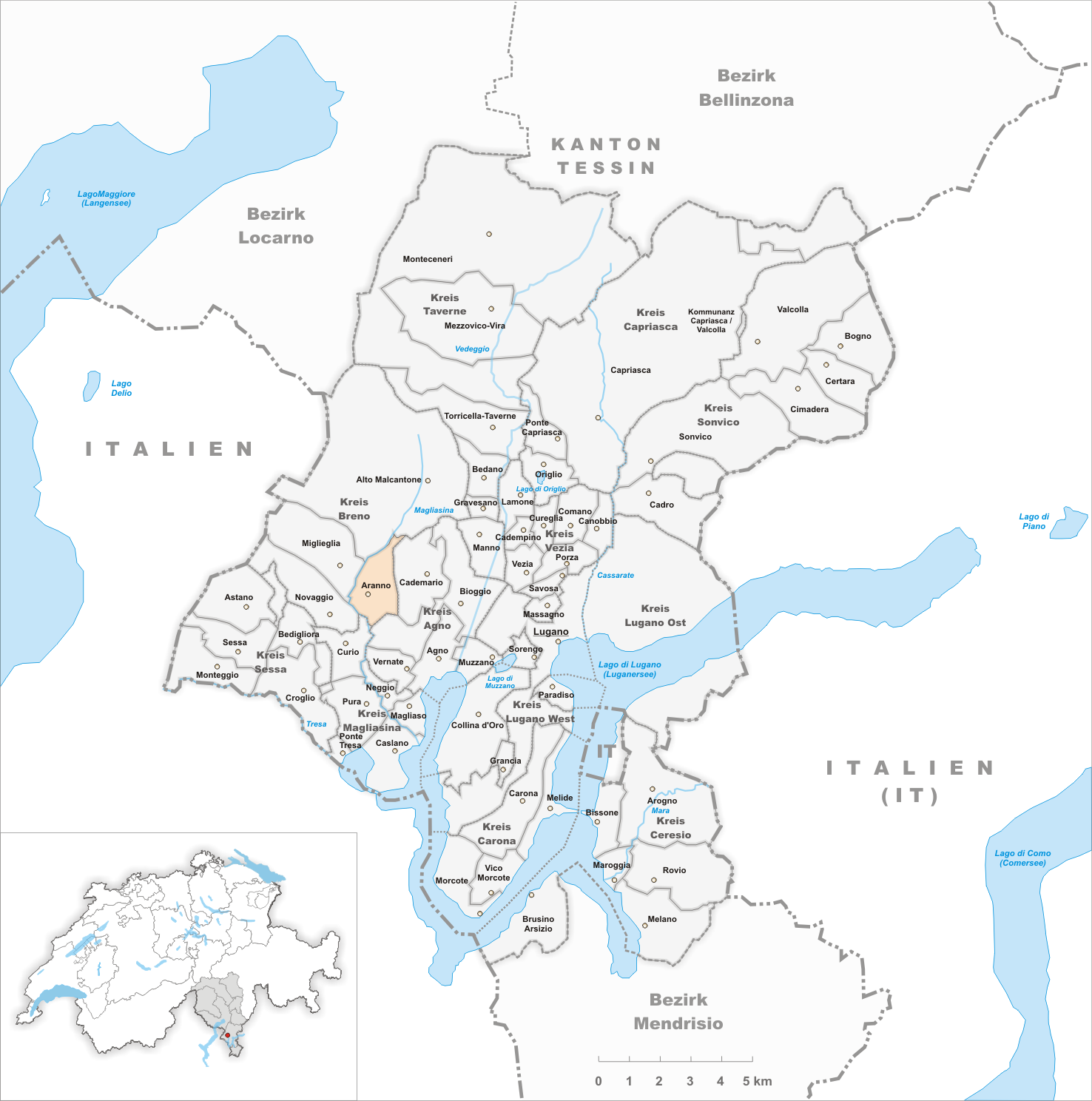 Municipality Aranno